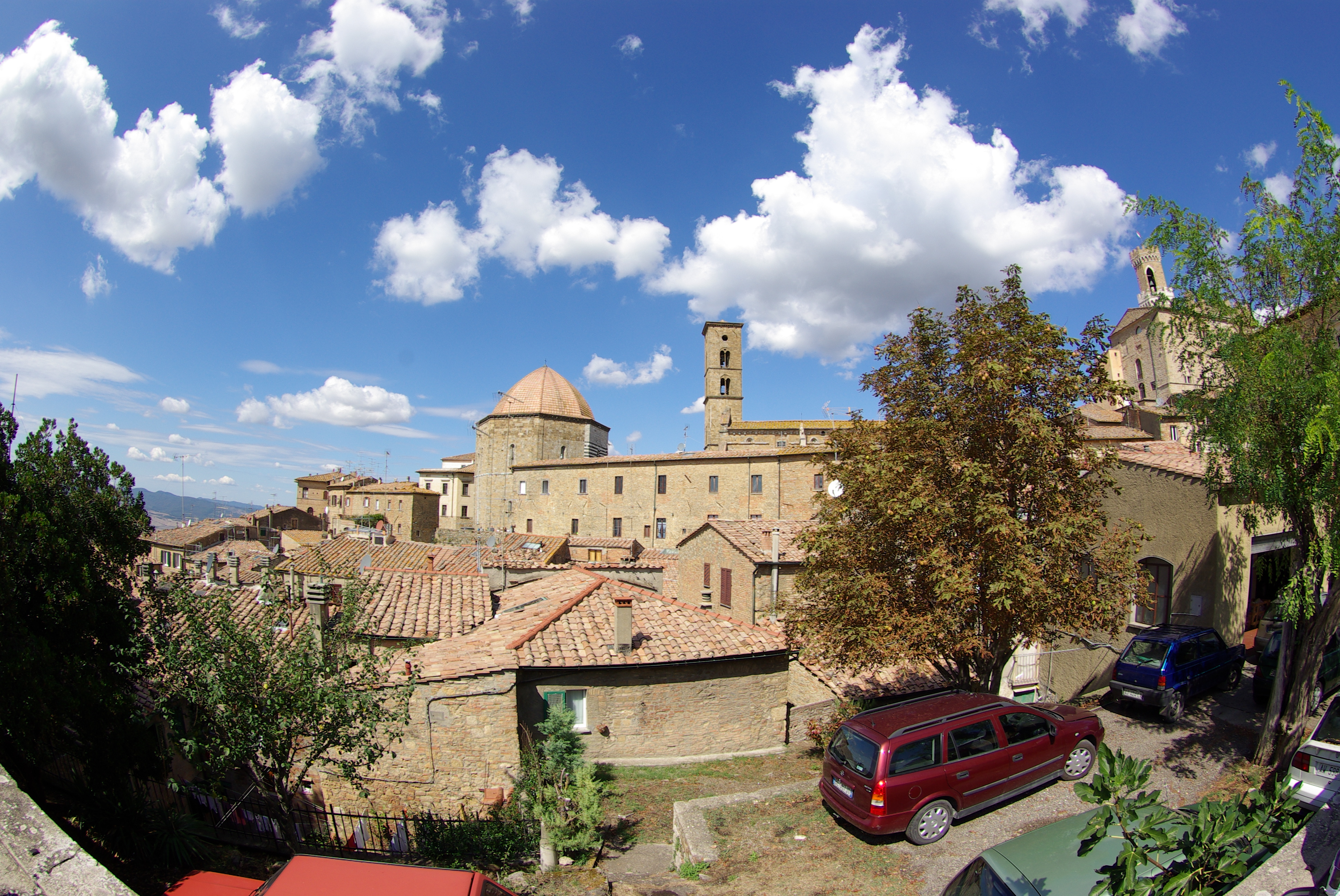 Stadt Panorama 1